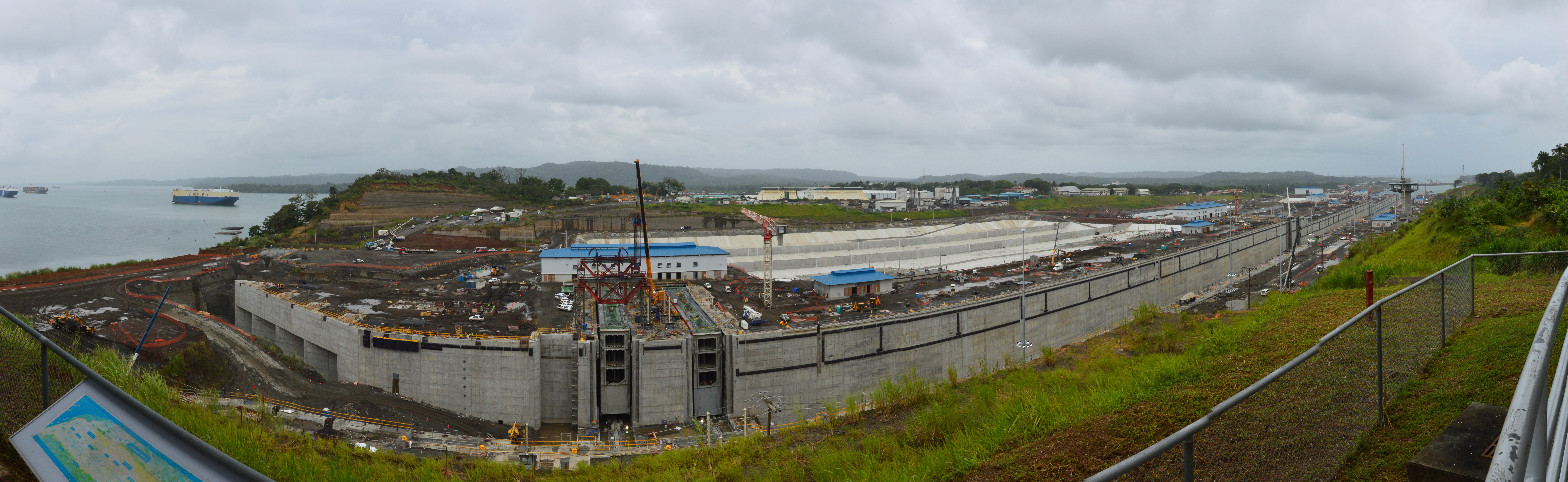 Panama kanali laiendamine.